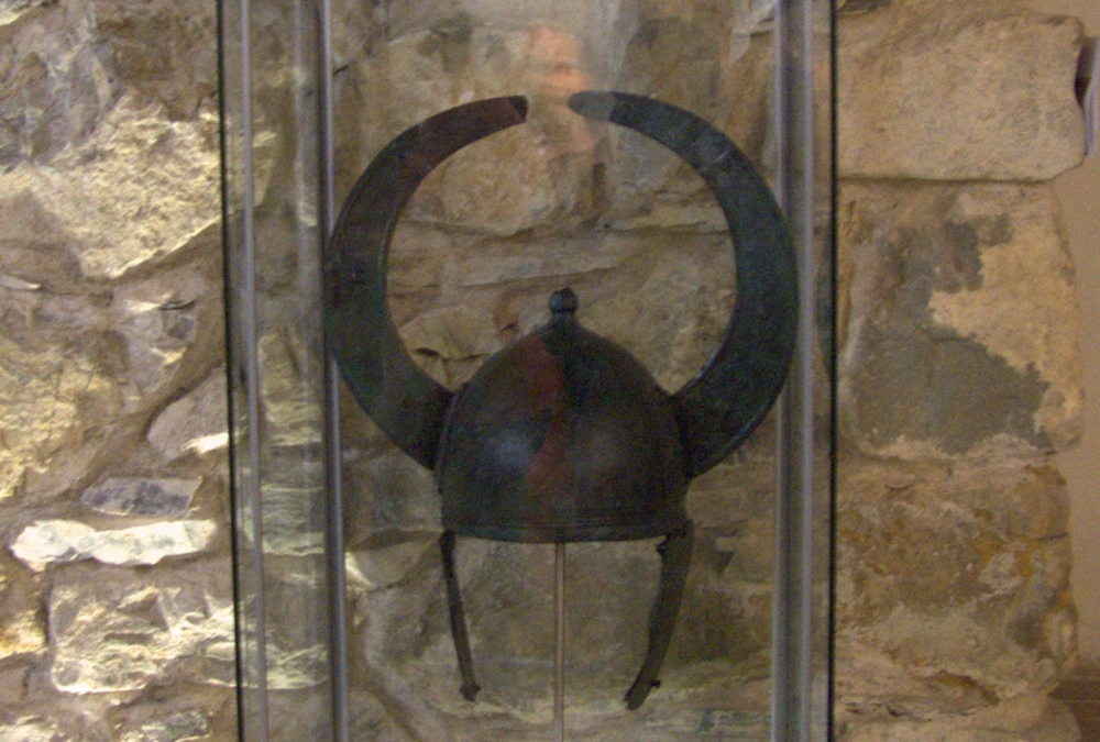 Riproduzione dell'elmo del guerriero Apuo/Ligure ritrovato vicino a Pulica